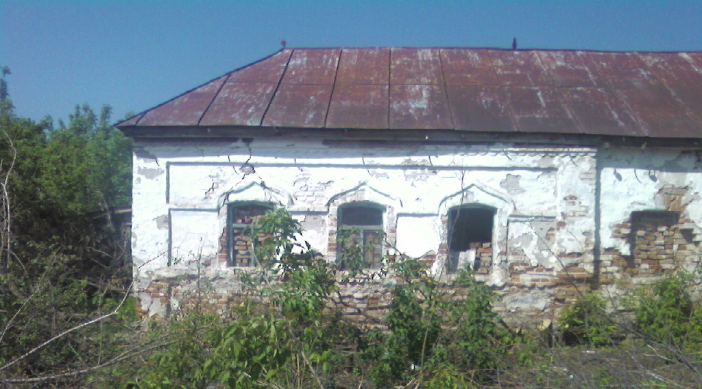 Заброшенный дом Поповых-Шеменевых. конец XIX века. Фото сделано в апреле 2010 г.